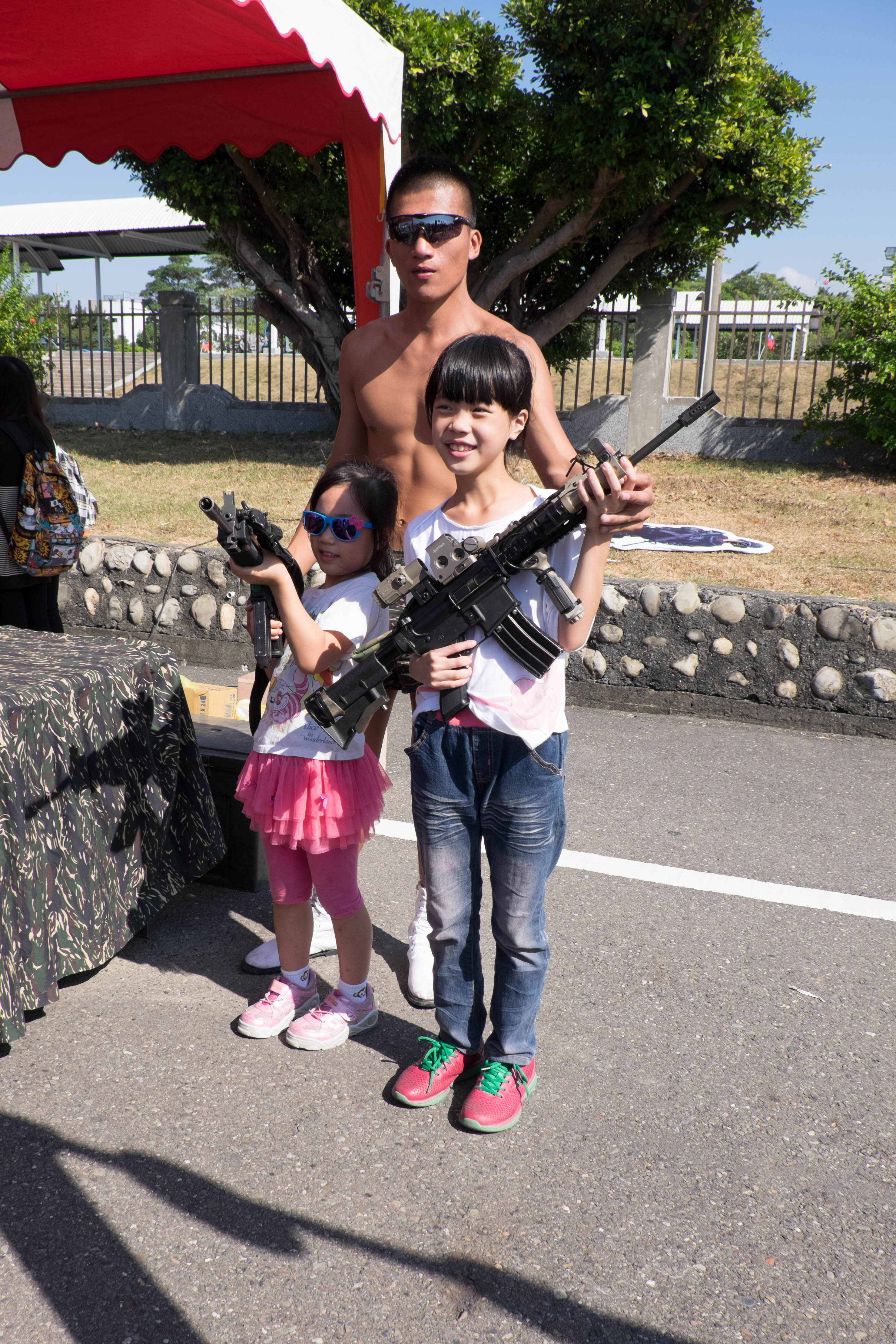 2014年左營軍港營區開放活動下午，海軍陸戰隊兩棲偵搜大隊人才募集攤位旁，海陸蛙人與持槍兒童合影。